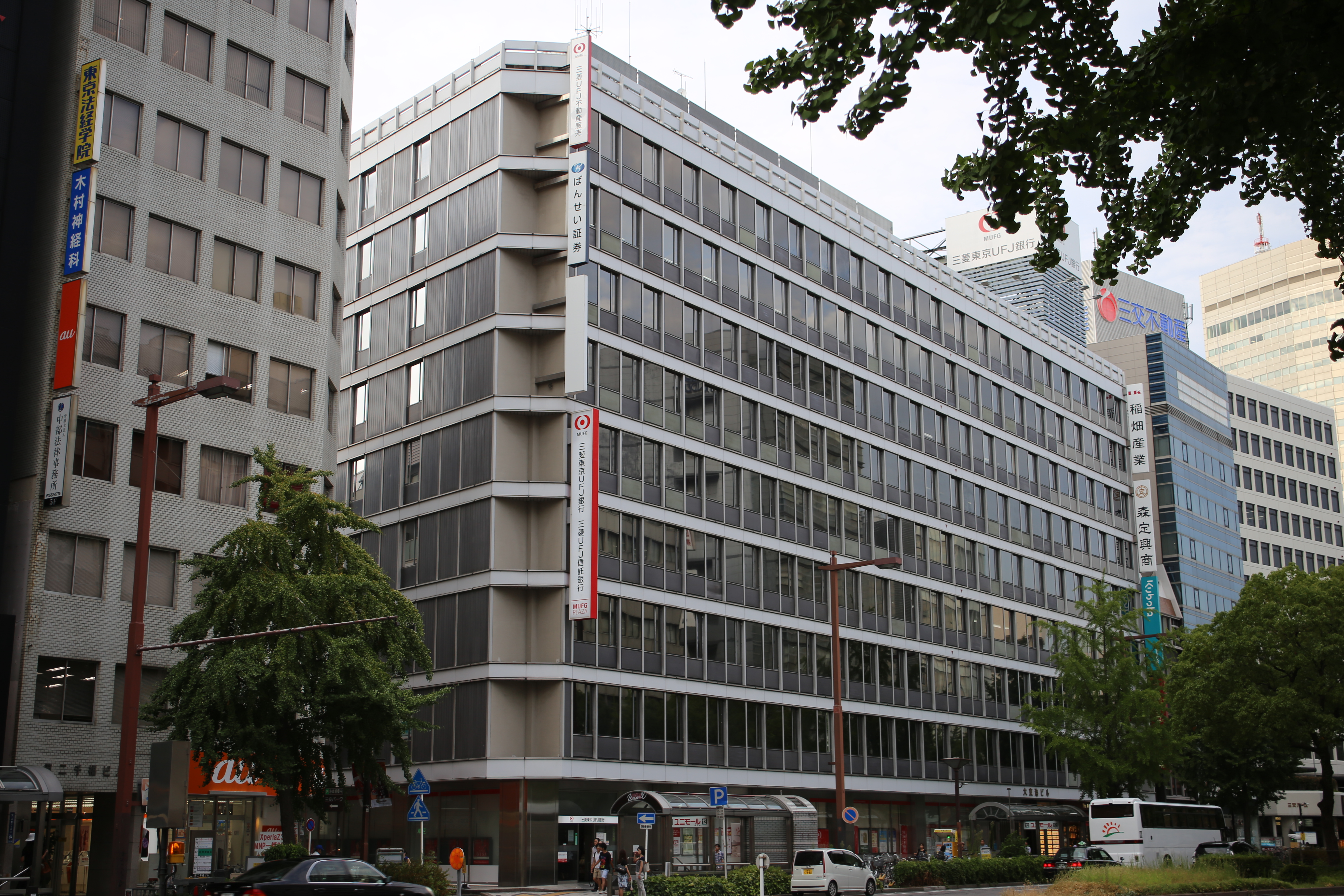 名古屋市中村区名駅三丁目の大東海ビルを南側公道西側より撮影